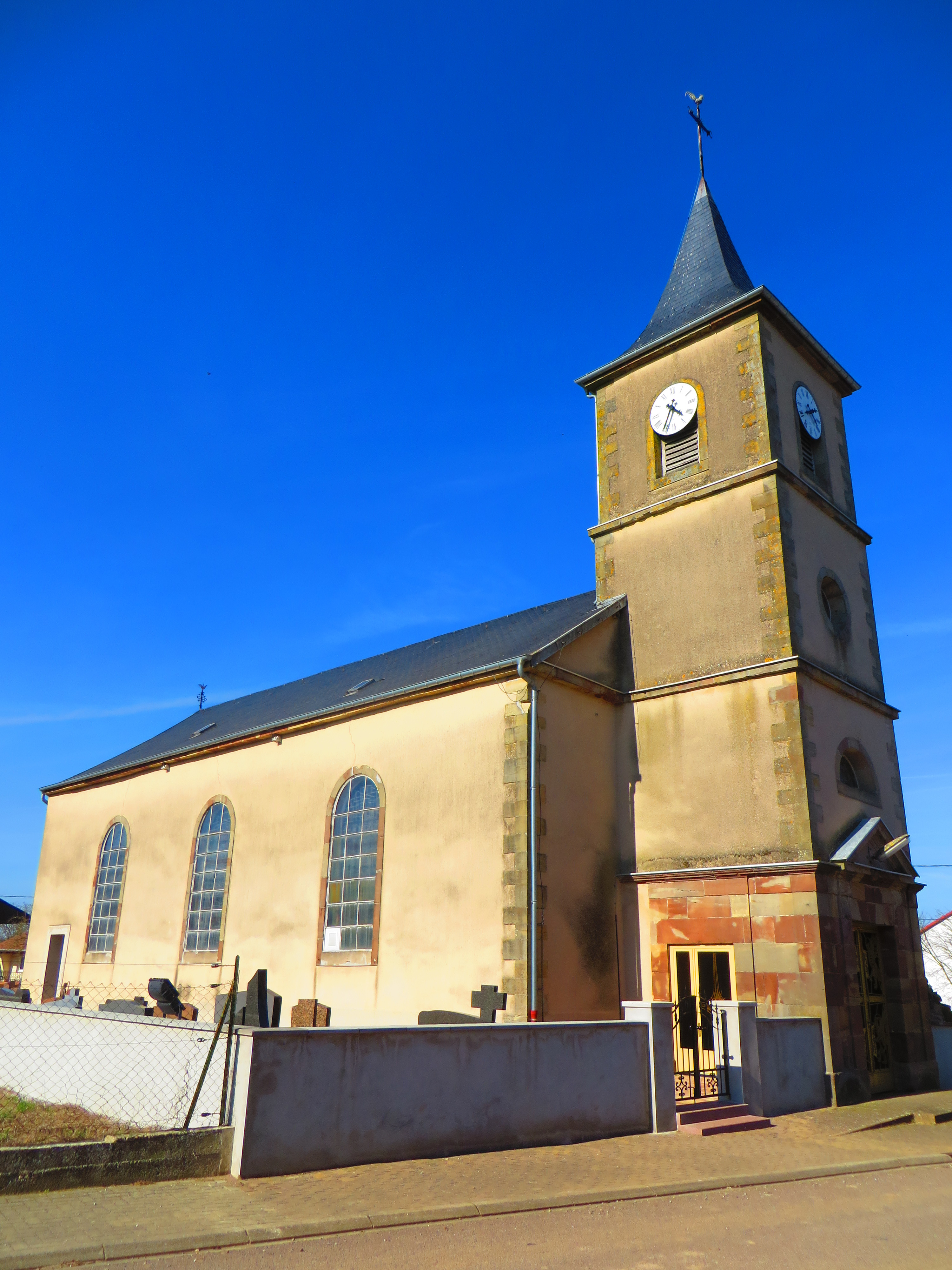 Gréning Église Saint-Joseph